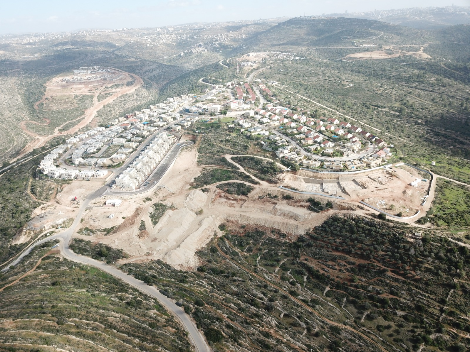 תצלום אווירי של היישוב נריה